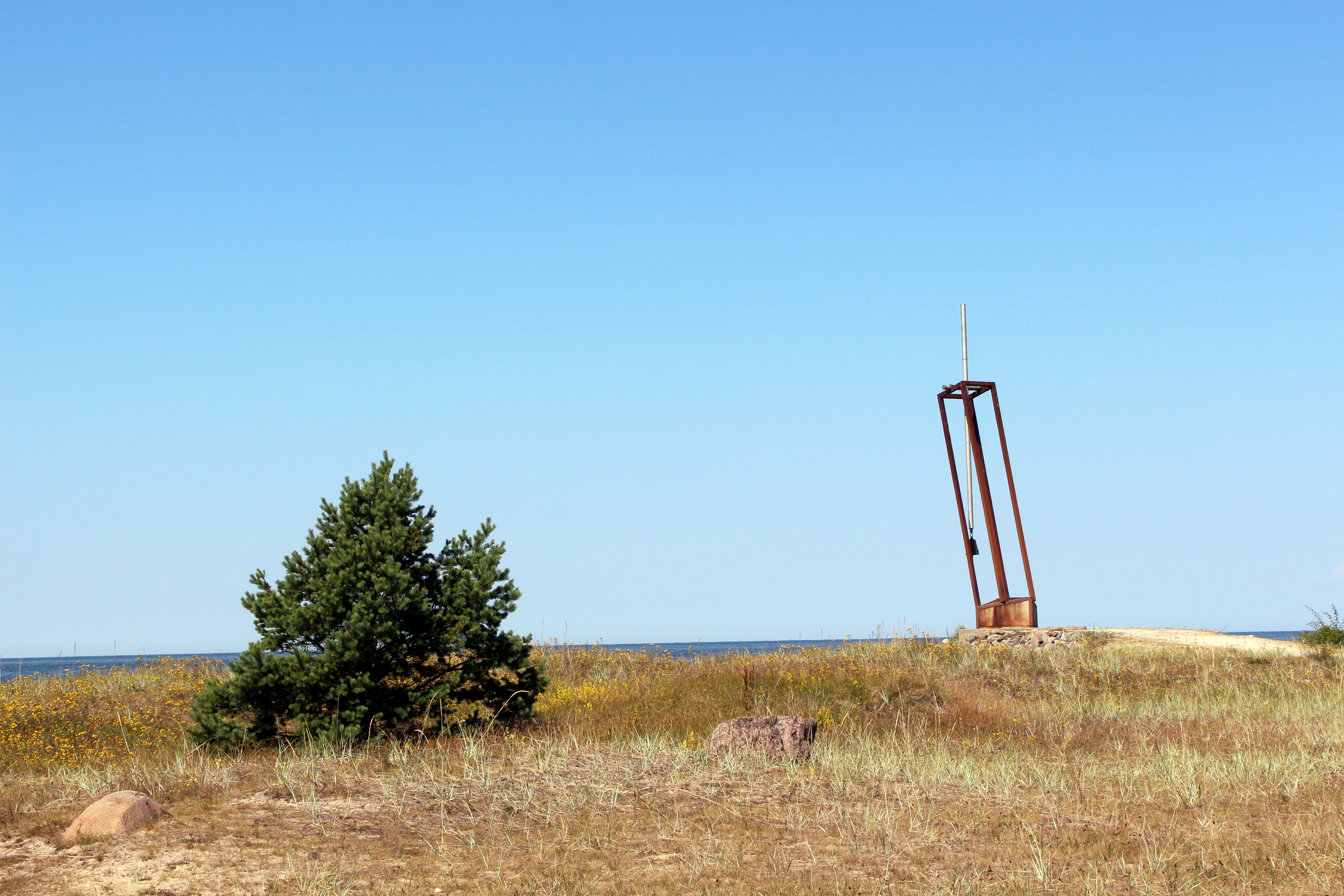 Parvlaeva "Estonia" hukkunute mälestusmärk Tahkunas.